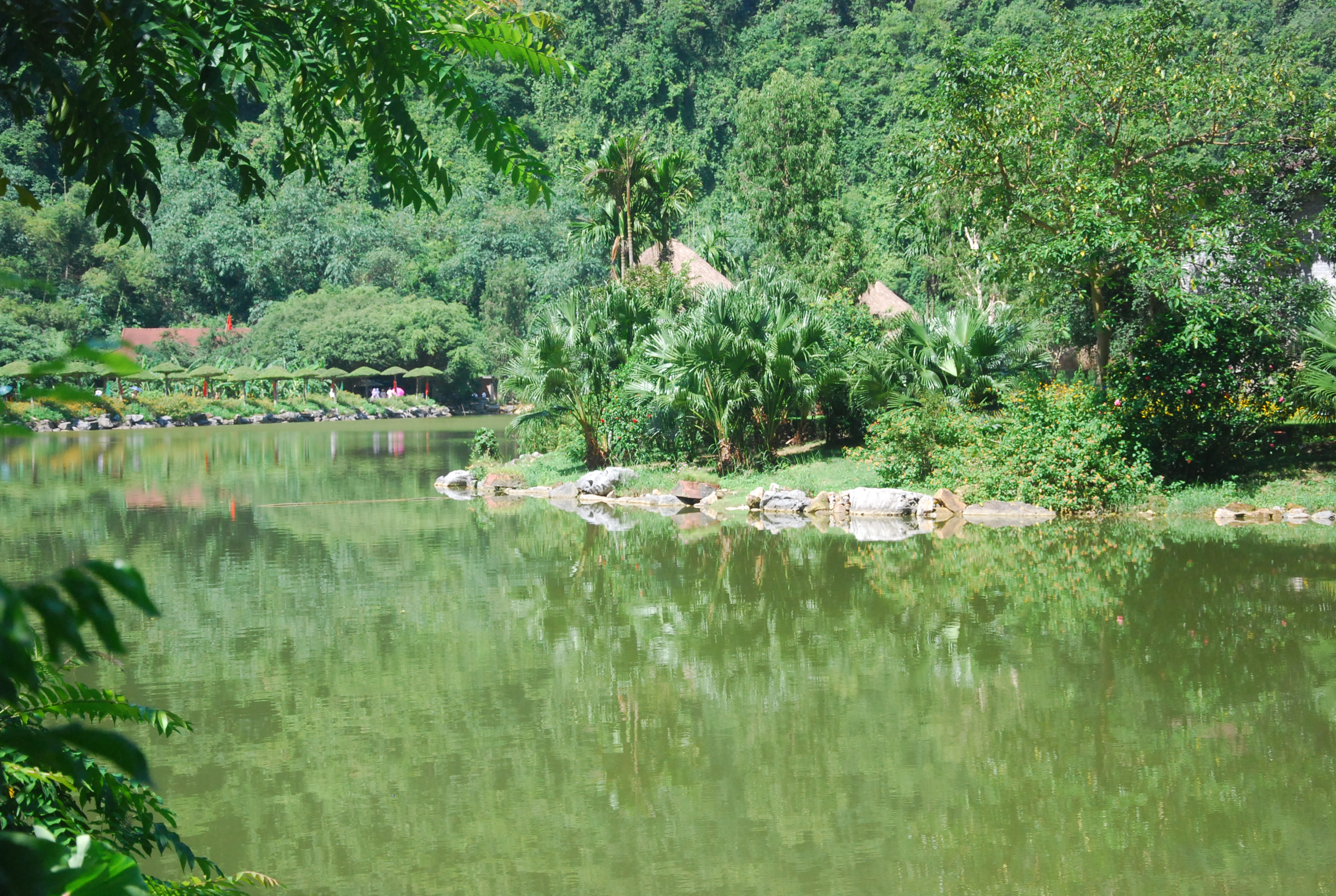 Phong cảnh Khu du lịch sinh thái Thung Nham ở Ninh Bình